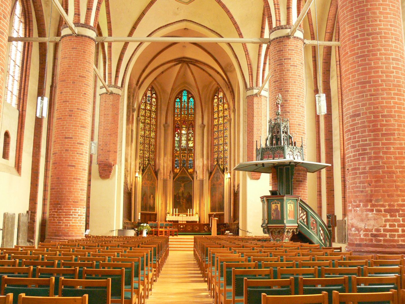 Greifswald, St Jacobi, Kanzel und Altar